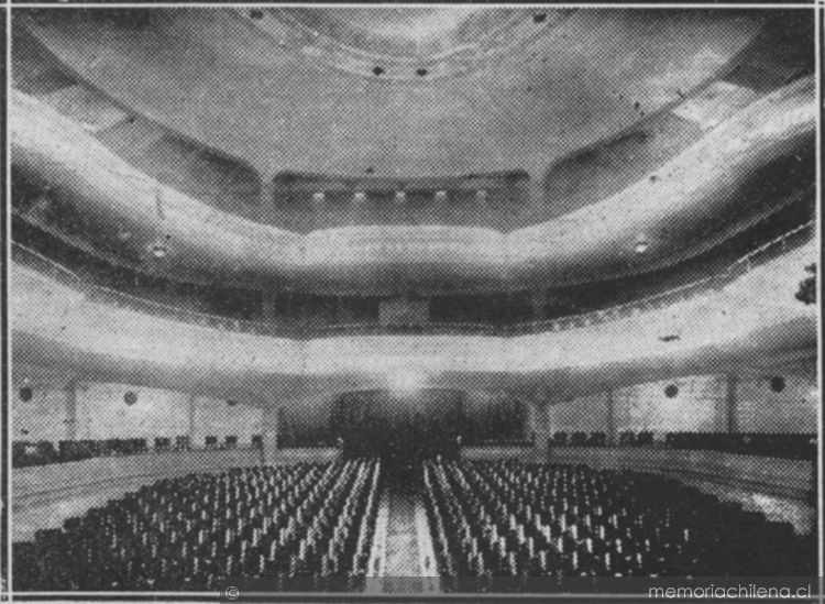 Los primeros teatros de Valparaíso y el desarrollo general de nuestros espectaculos públicos / Roberto Hernández. Valparaíso: Impr. San Rafael, 1928. 659 p.